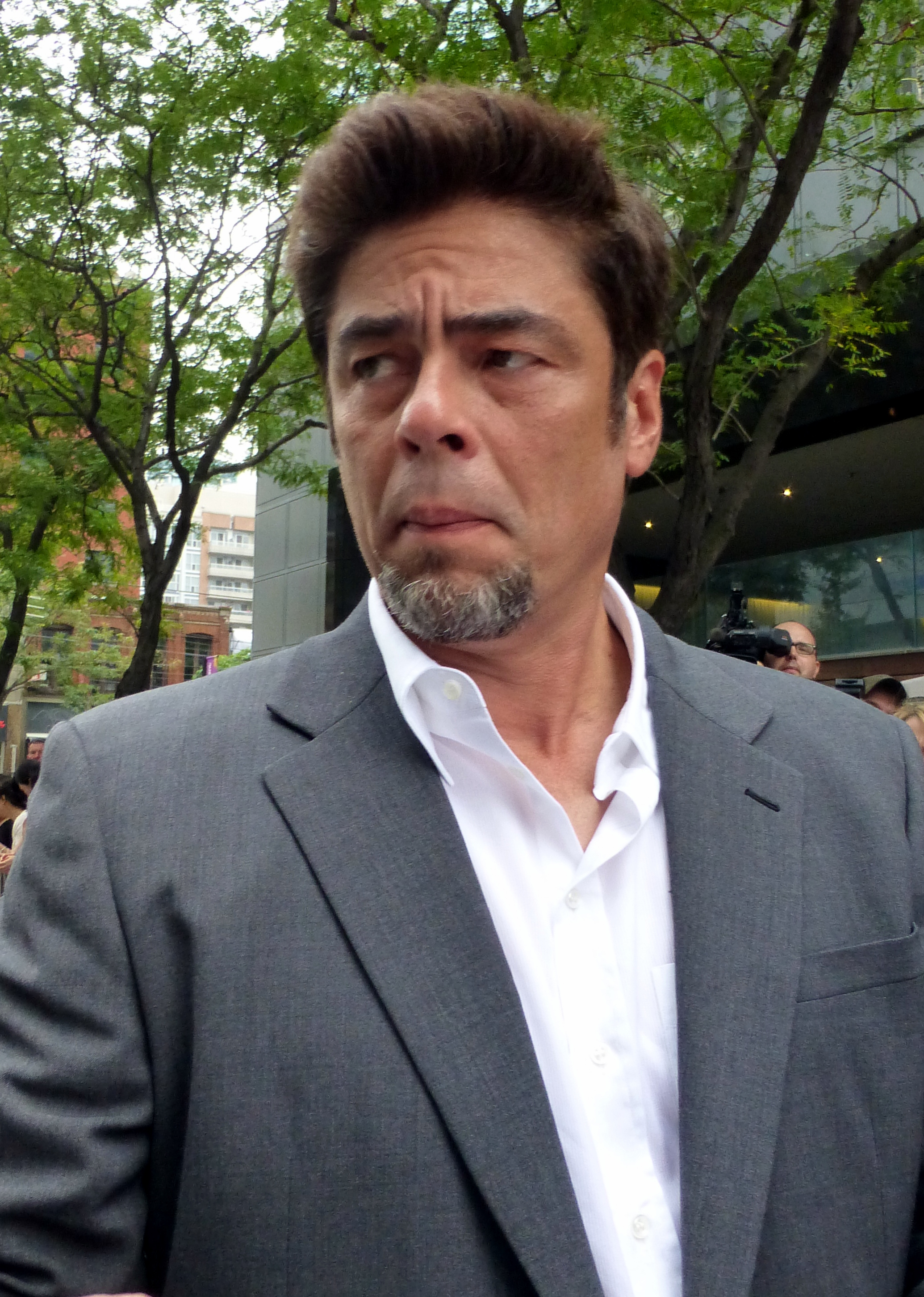 Benicio Del Toro at Escobar Paradise Lost press conference, 2014 Toronto Film Festival